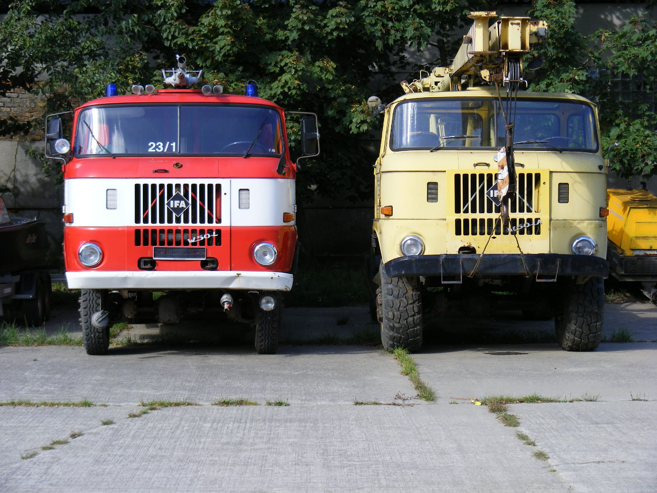 IFA W50 Löschfahrzeug und ADK 70 im Technik-Museum Pütnitz.